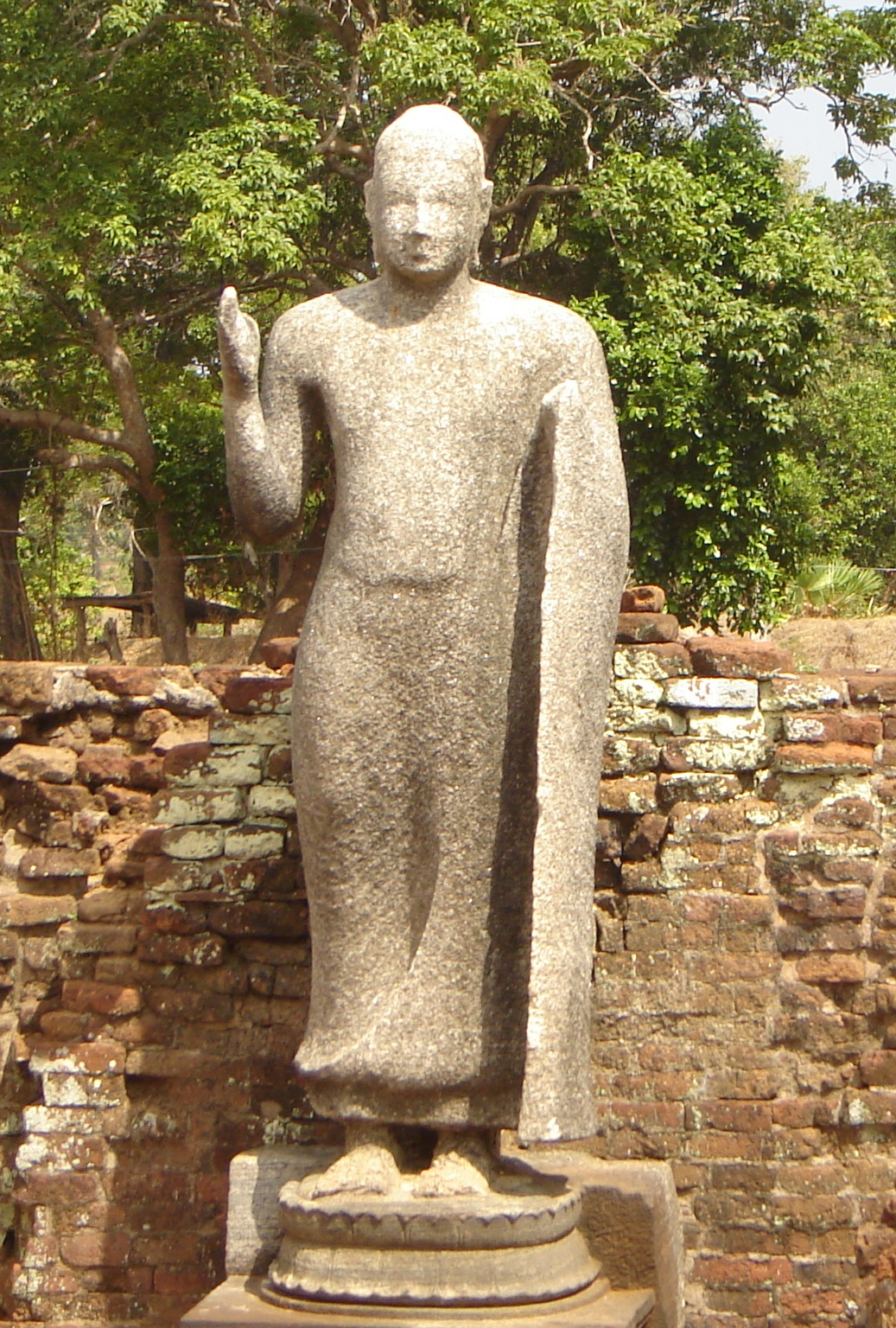 සිංහල: ත්‍රිකුණාමල පරිපාලන දිස්ත්‍රික්කයේ වෙල්ගම්වෙහෙර ඇති හිටි බුදුපිලිමය